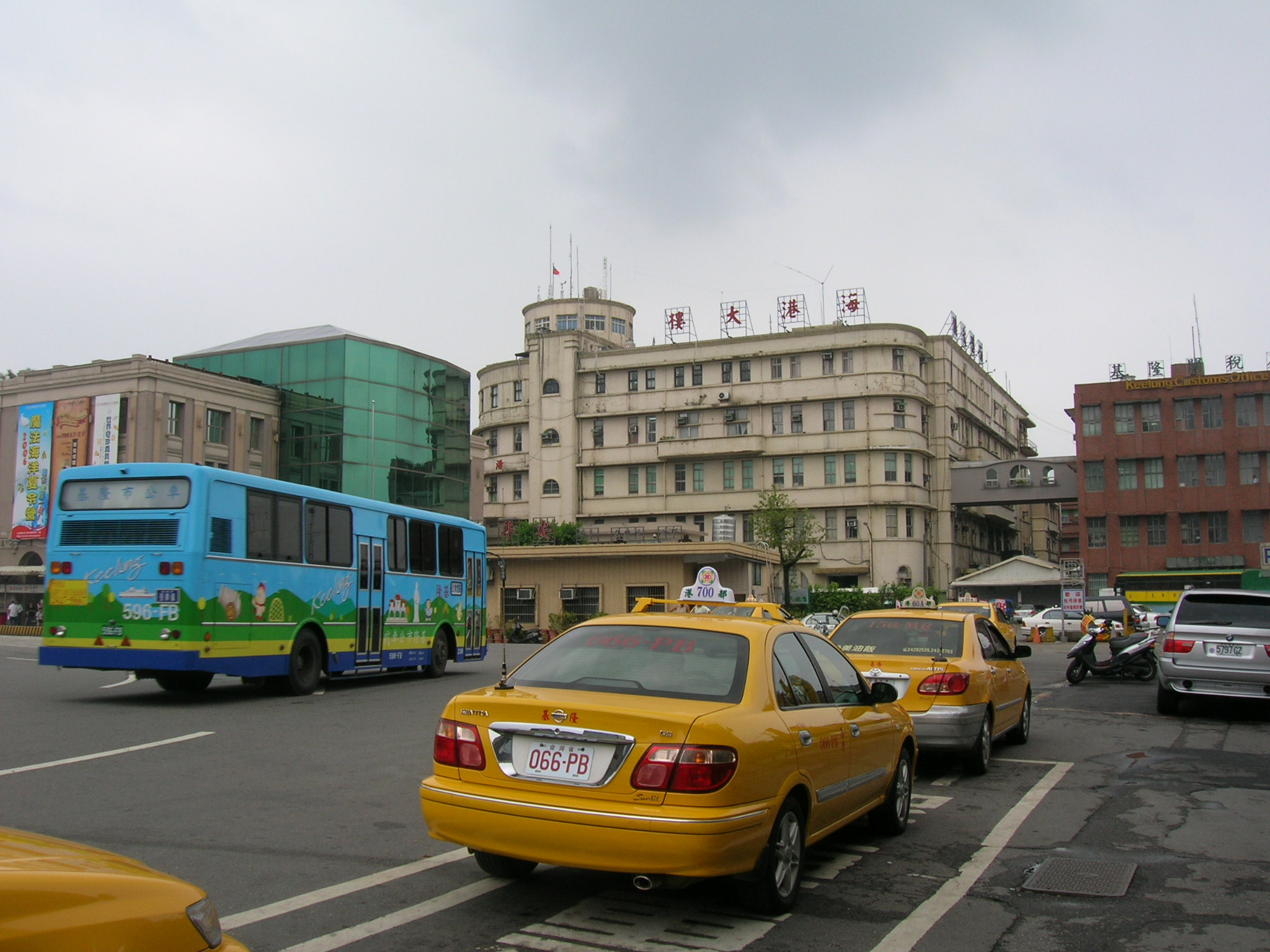 中文（台灣）: 基隆港聯合辦公大樓。左：陽明海運舊廈，中：海港大樓，右：基隆關稅局。 Bân-lâm-gú: Ke-lâng-káng liân-ha̍p pān-kong tuā-lâu. Tsó:Iông-bîng Hái-ūn kū hā. Tiong:Hái-káng Tuā-lâu. Iū:Ke-lâng Kuan-suè-kio̍k. 基隆港聯合辦公大樓。左：陽明海運舊廈，中：海港大樓，右：基隆關稅局。